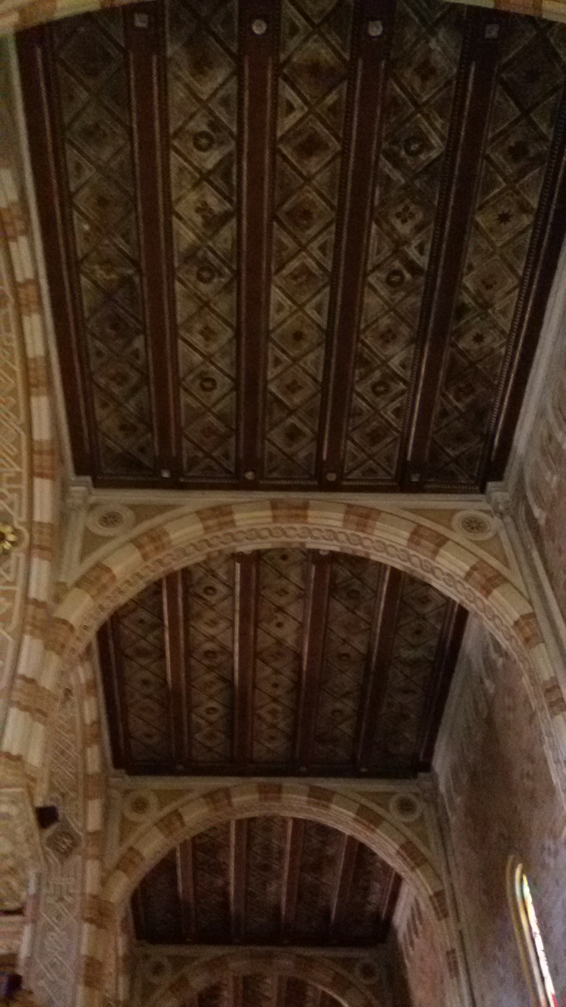 Chiesa di Santa Cristina Quinto di Treviso